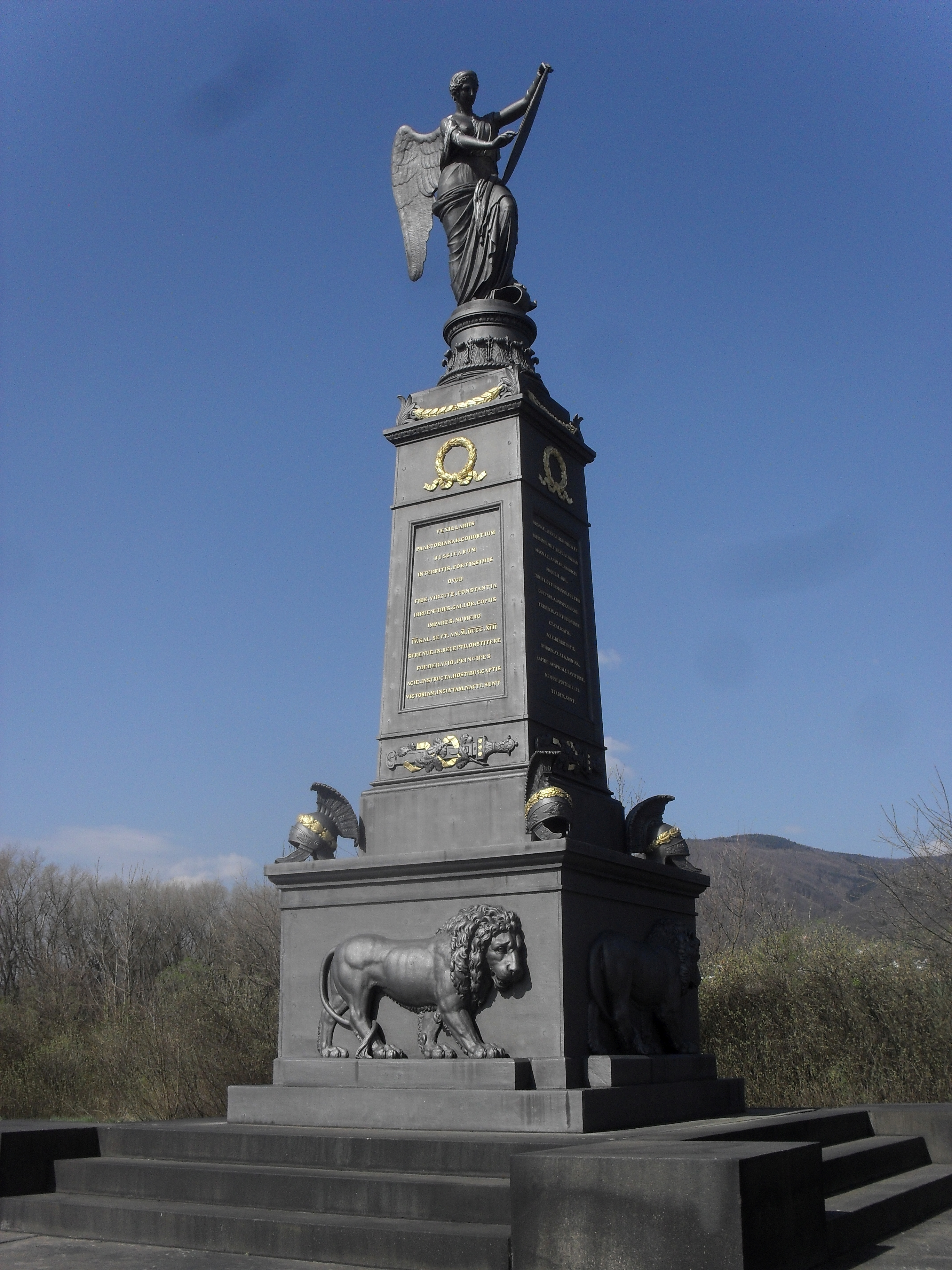 Ruský památník bitvy o Chlumec, kde roku 1813 došlo k porážce Napoleonských vojsk.